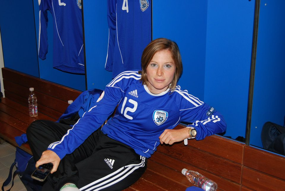 עדי שטיין במדי נבחרת ישראל